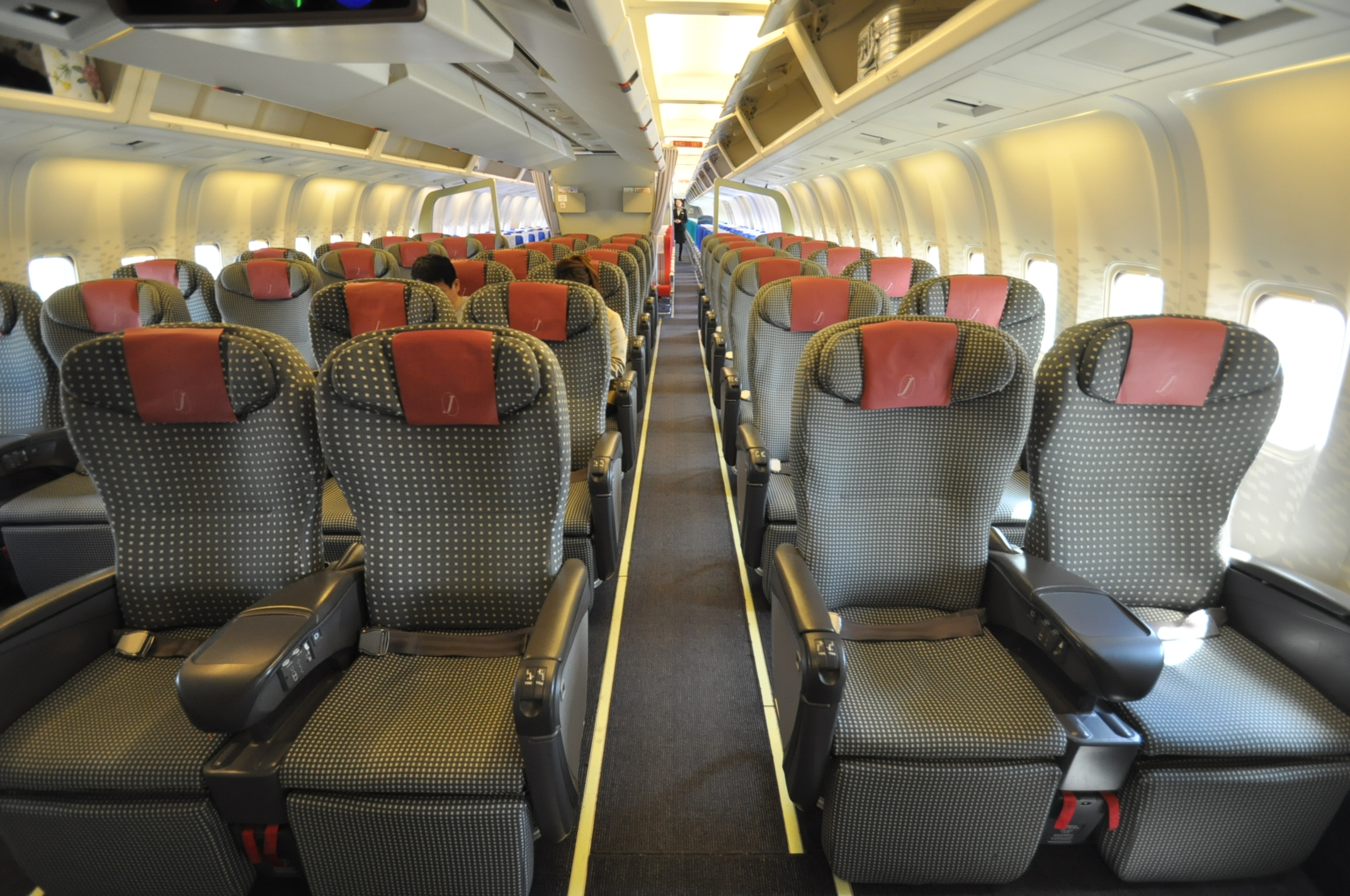 日本航空国内線クラスＪシート（B767-300)